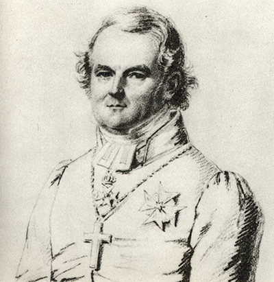 Anders Carlsson af Kullberg (1771-1851)